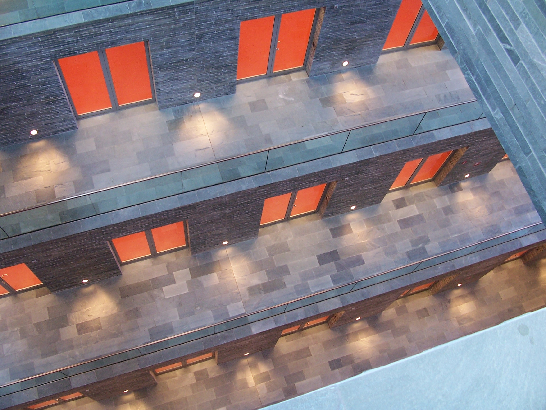 Beeld en Geluid Museum Netherlands